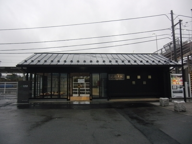 JR東日本水戸線の羽黒駅の新駅舎です。